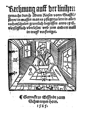 522 erschien ein zweites Buch. Es hieß "Rechnung auff der Linihen und der Federn". Darin beschrieb er das Rechnen mit dem Rechenbrett, das Aufschreiben von Aufgaben und vielfältige Übungen.